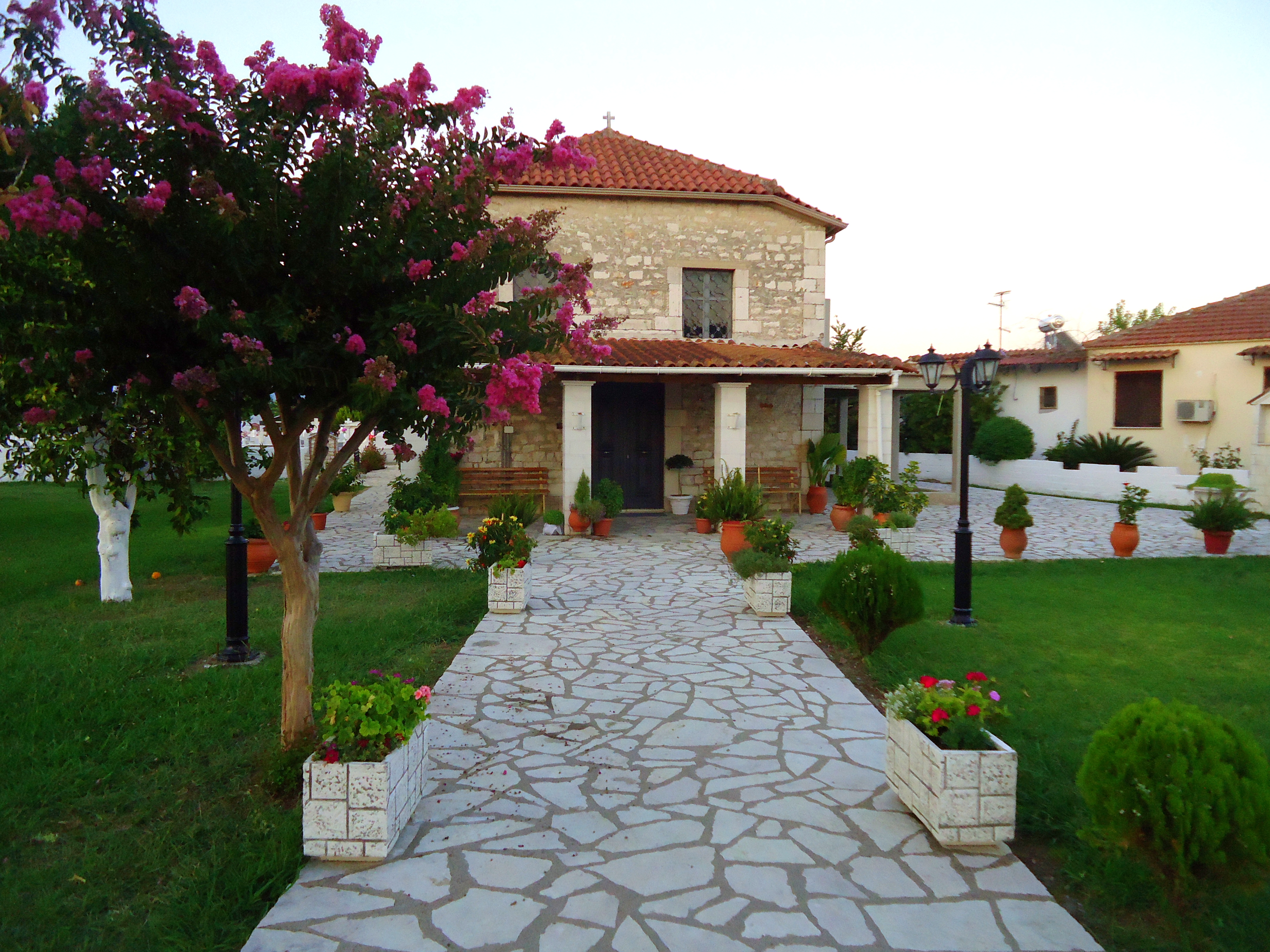 Ι.Ν Κοιμήσεως της Θεοτόκου, ο οποίος κατασκευάστηκε το 1915.